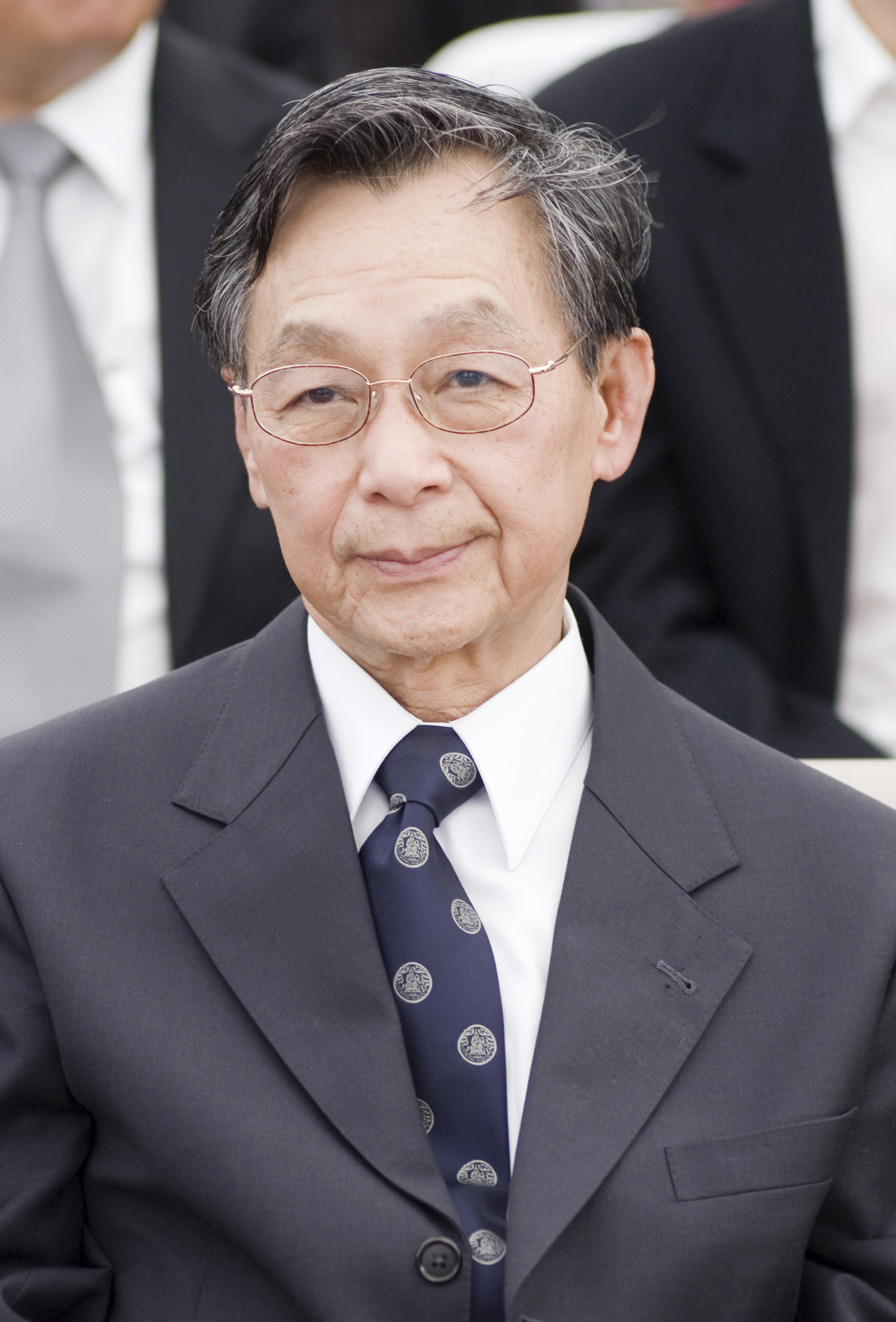 ชวน หลีกภัย / นายกรัฐมนตรีเข้าร่วมพิธีฝังศพ นายเล็ก นานา อดีตเลขาธิการ และผู้ร่วมก่อตั้งพรรคประชาธิปัตย์ โดยพระบาทสมเด็จพระเจ้าอยู่หัวฯ ทรงพระราชทานดินฝังศพ นายเล็ก นานา ณ มัสยิด นูรุ้ลมู่บีน 1เมษายน 2553 (The Official Site of The Prime Minister of Thailand Photo by พีรพัฒน์ วิมลรังครัตน์)